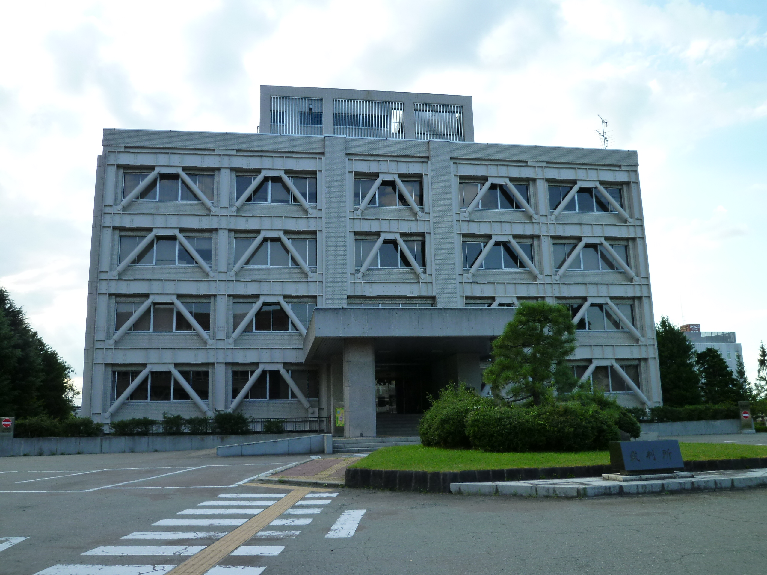 山形地方裁判所（山形市旅篭町）